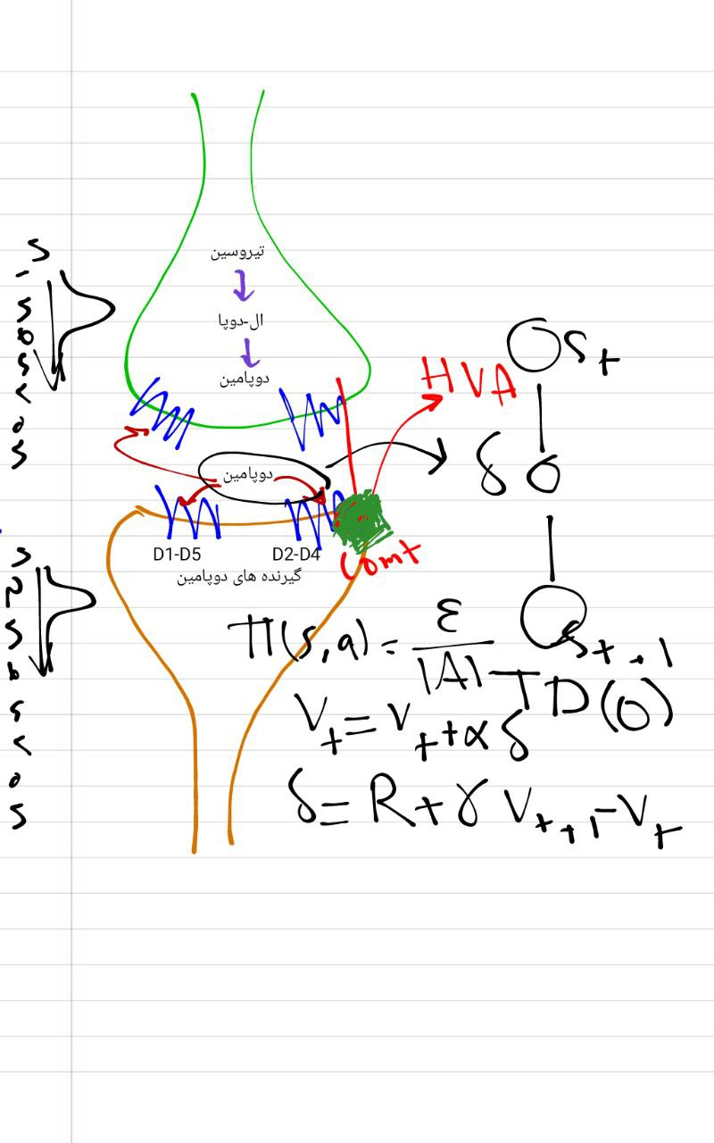 مدل سازی ریاضی ارتباطات دوپامینزژیک در غلاف سیناپسی بر اساس نظریه یادگیری تقویتی